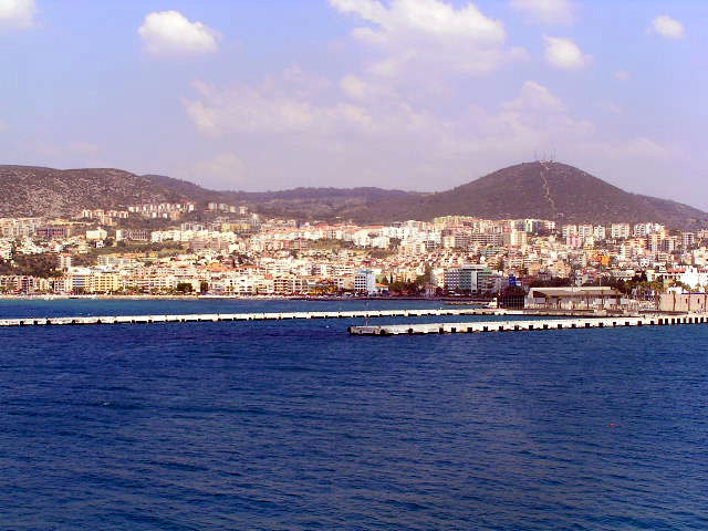 поглед на луку; Кушадаси / Ајдин, Турска